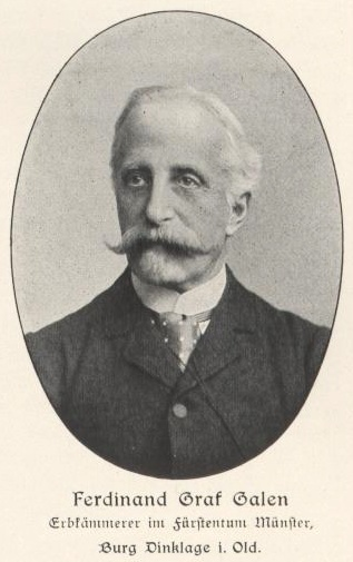 Ferdinand Graf von Galen (1831-1906), Deutscher Reichstagsabgeordneter (Zentrum), Vater des berühmten Kardinals